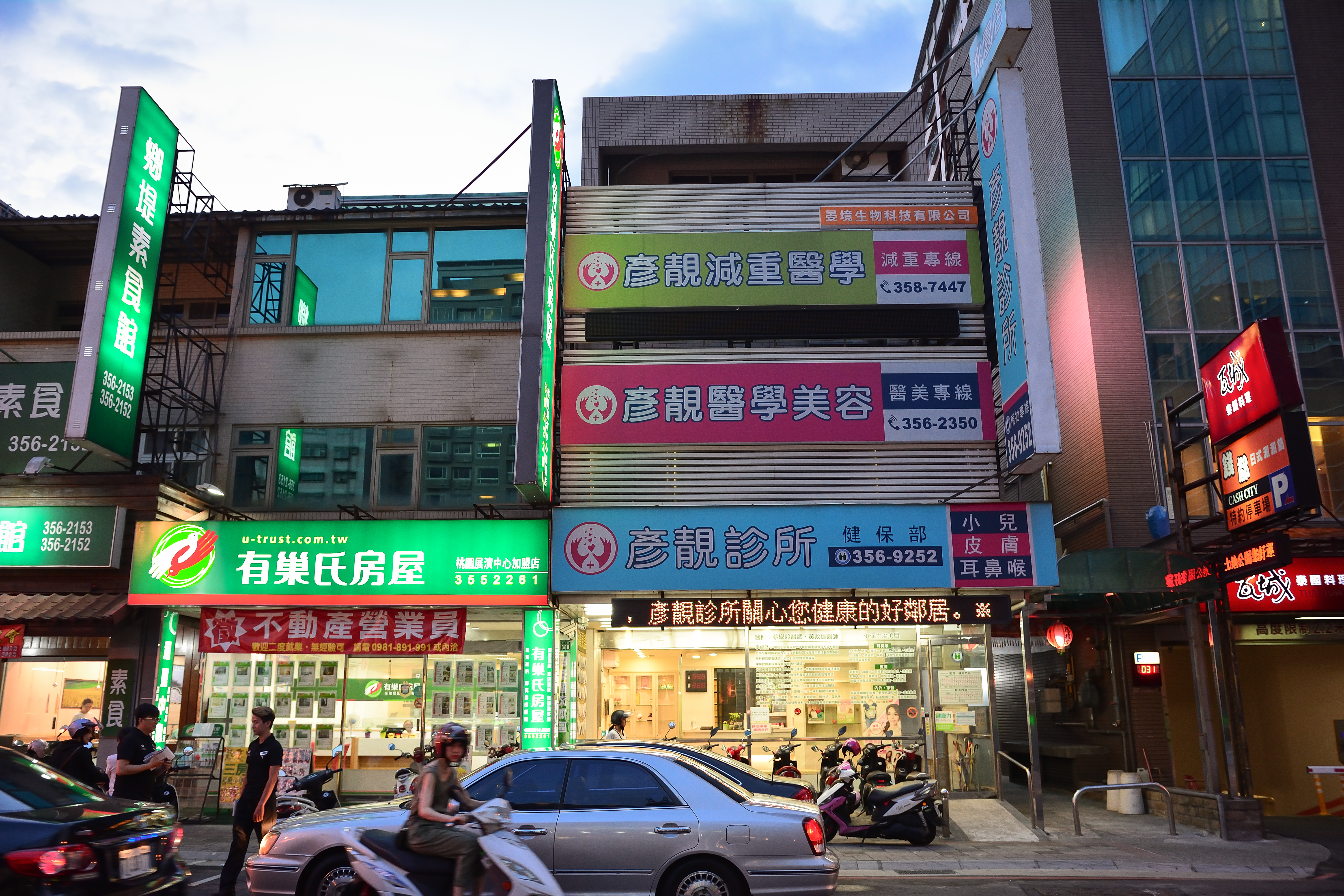 中文（台灣）: 有巢氏房屋桃園展演中心加盟店、彥靚診所。雖然室內燈光及屋外的招牌都已亮起，但天色還沒變黑。